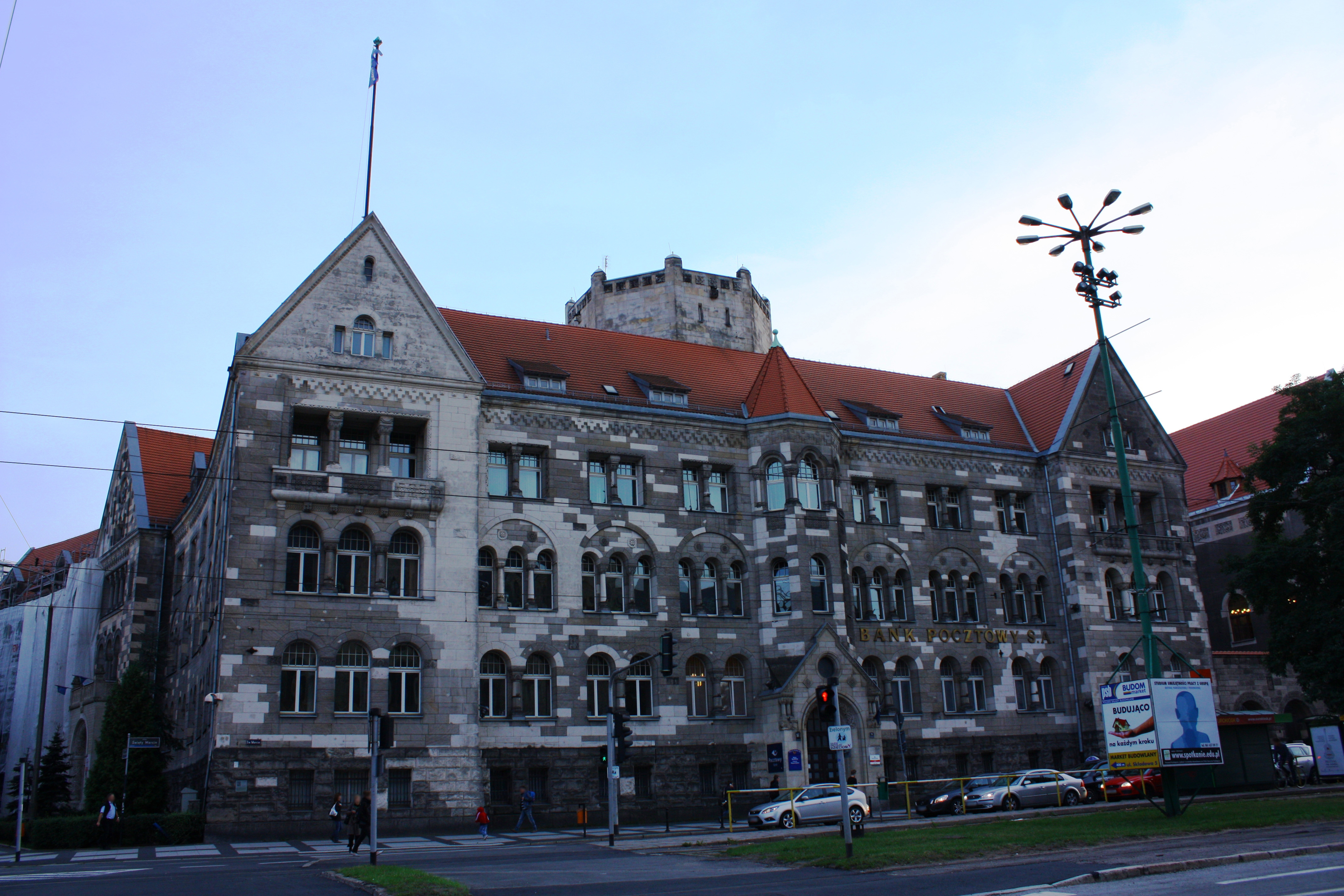 Poznań, ul. Kościuszki 77 - Dyrekcja Poczty, widok z ulicy Św. Marcin (zabytek nr A 324)